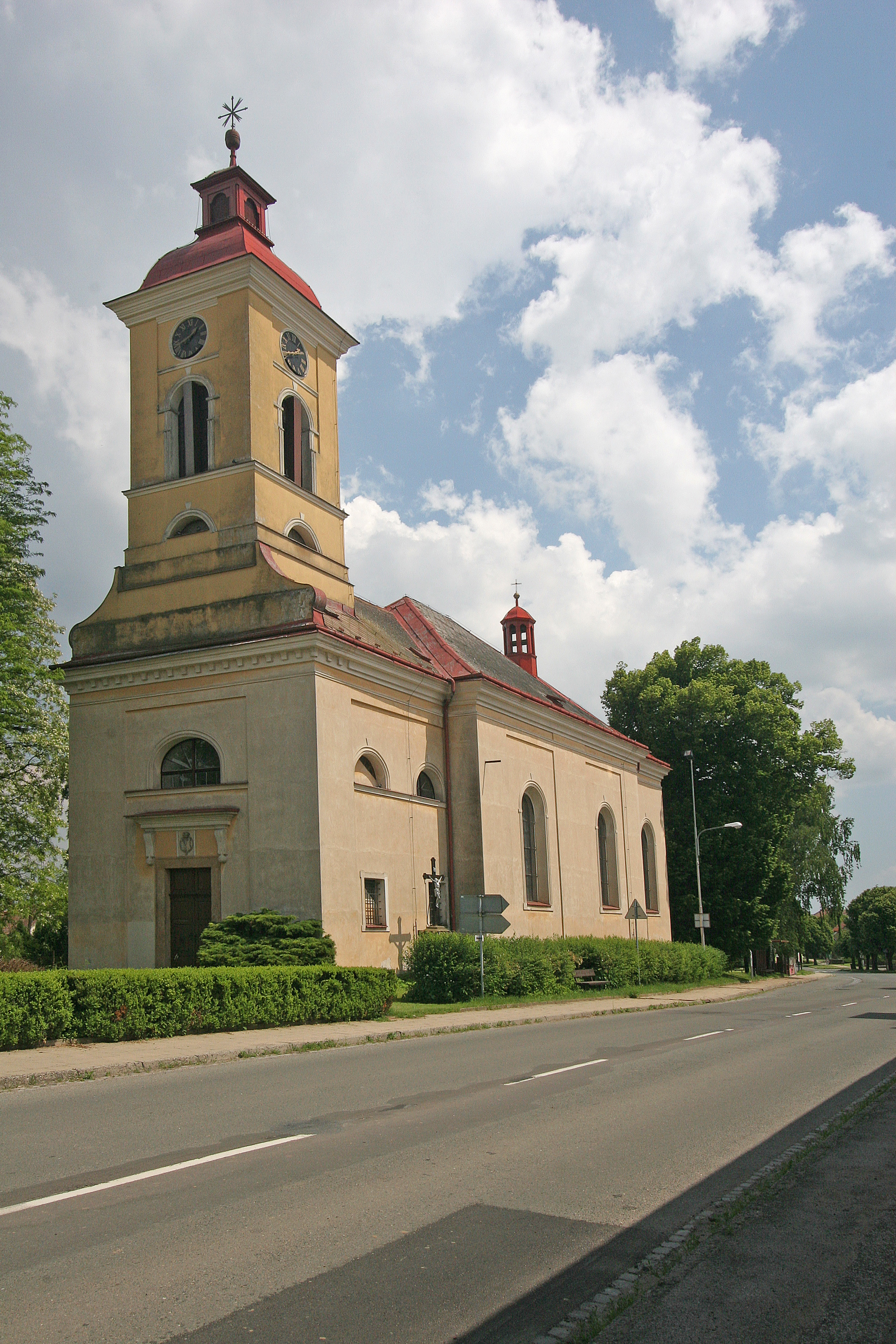 Stěžery kostel sv. Marka